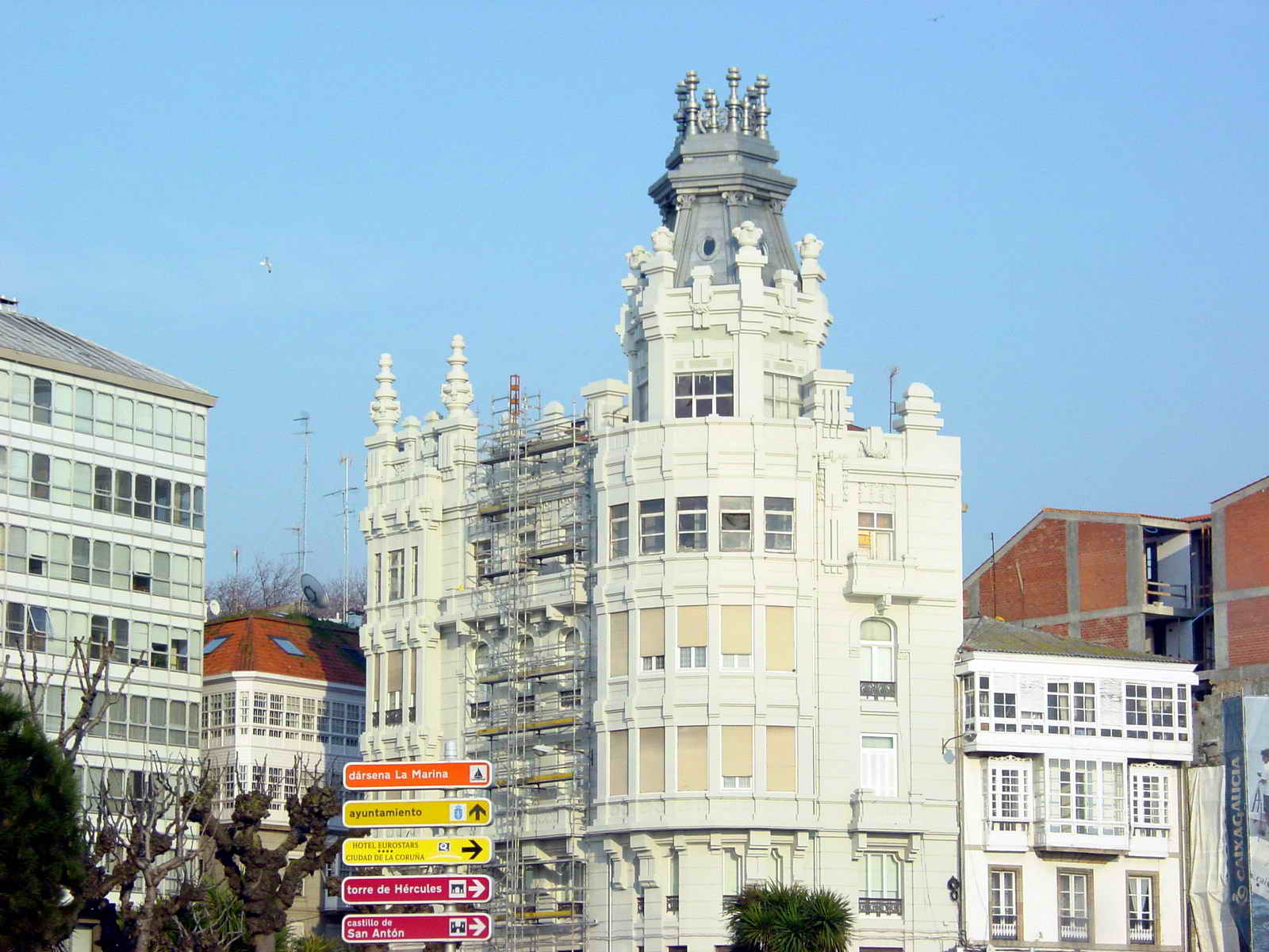 A Coruña - Galicia - Spain